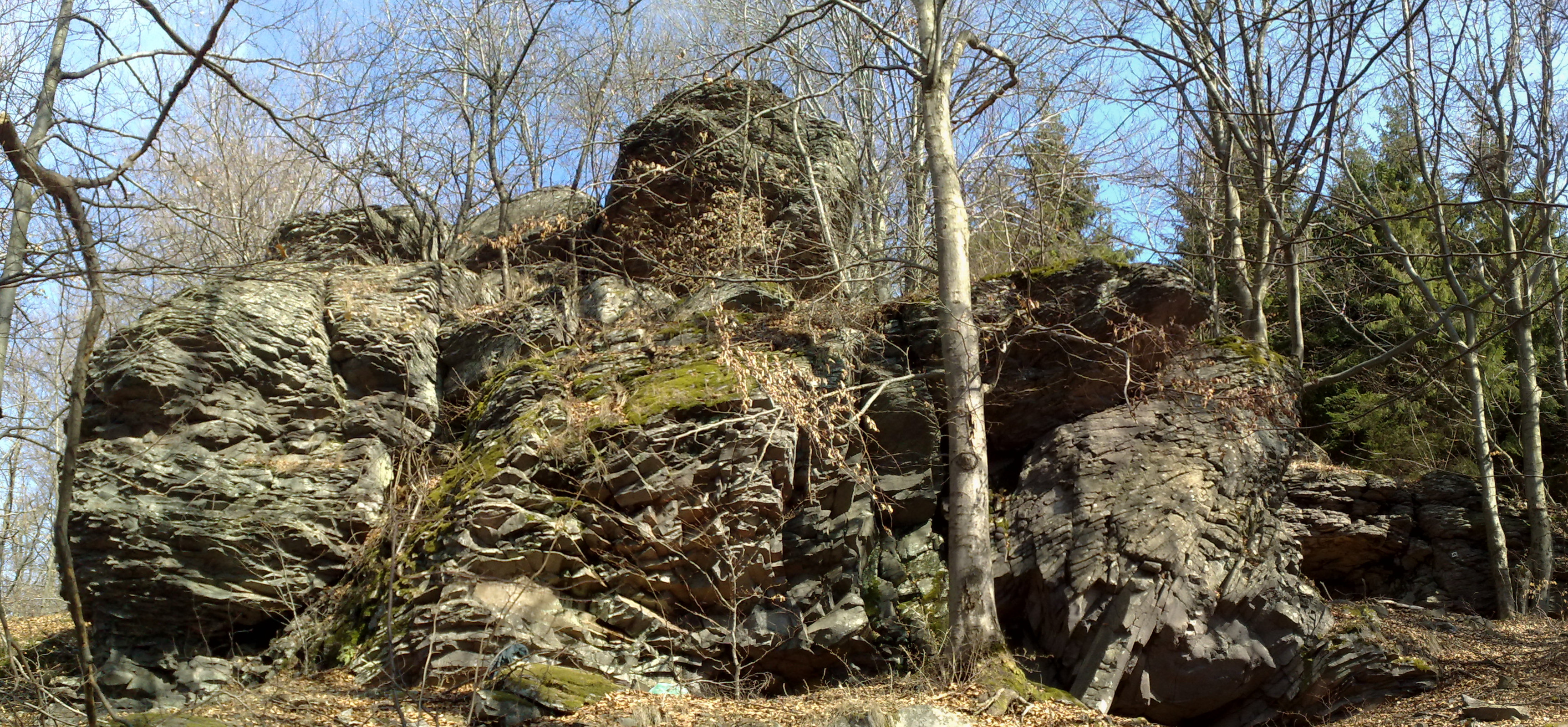 Budinská skala: "Budinská opica" a "Jánošíkova izba"